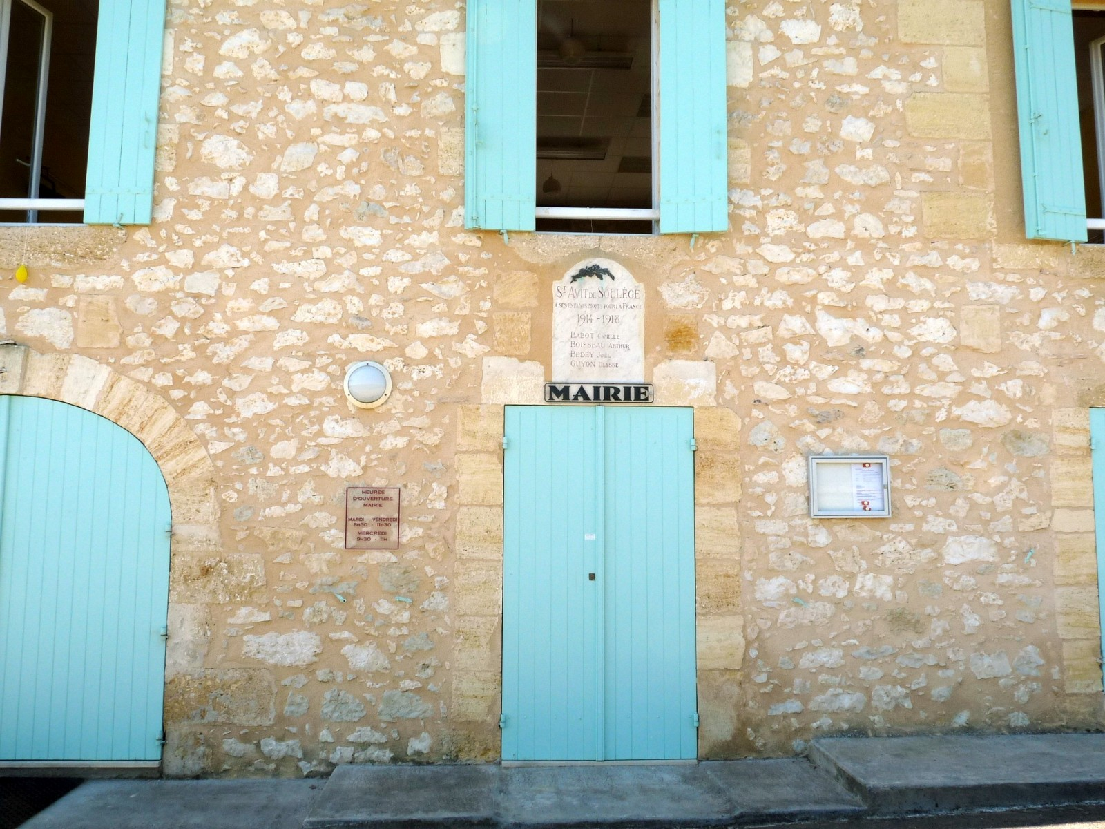 Mairie de St-Avit-de-Soulège, Gironde, France